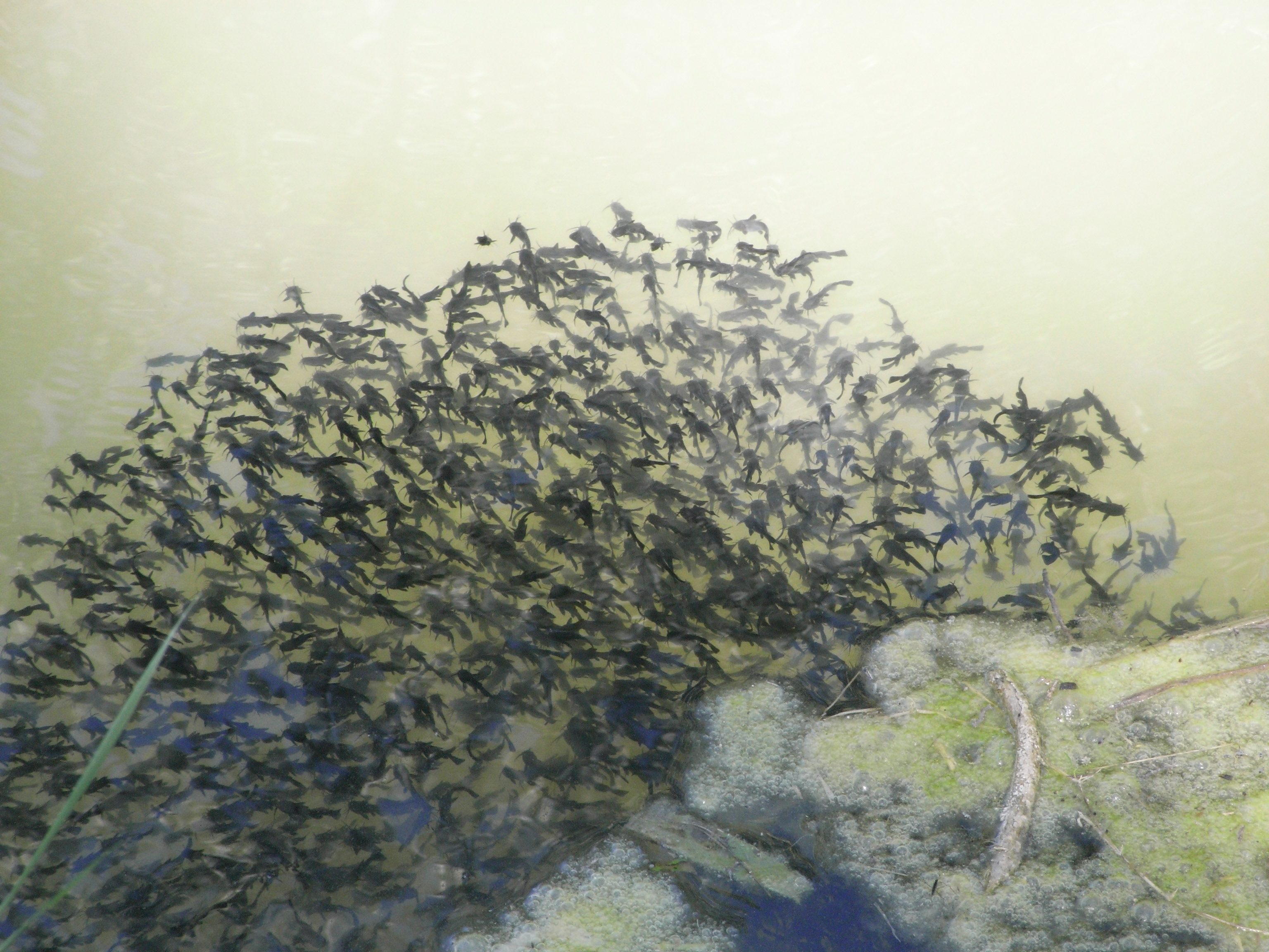 Alevins groupés du poisson chat nord américain Ameiurus melasintroduit en Europe, ici en France dans le Canal du Mignon traversant le Marais Poitevin (France).